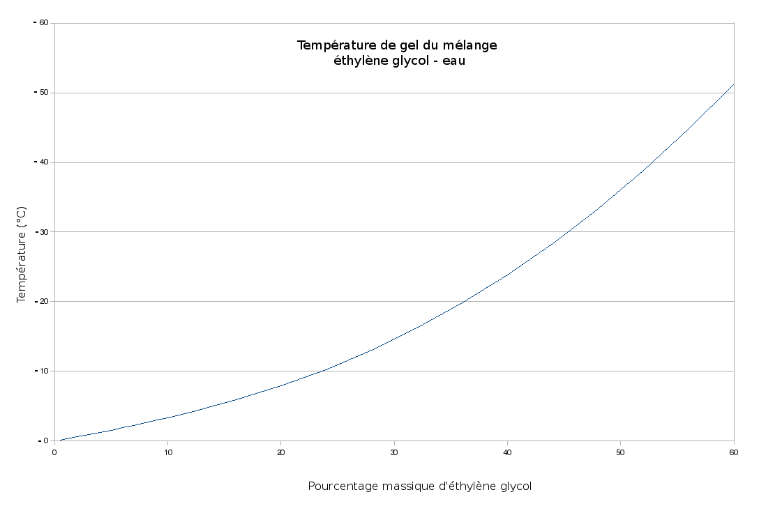 Température de gel de l'Éthylène glycol en fonction du pourcentage massique, d'après CRC Handbook Chem. & Phys.